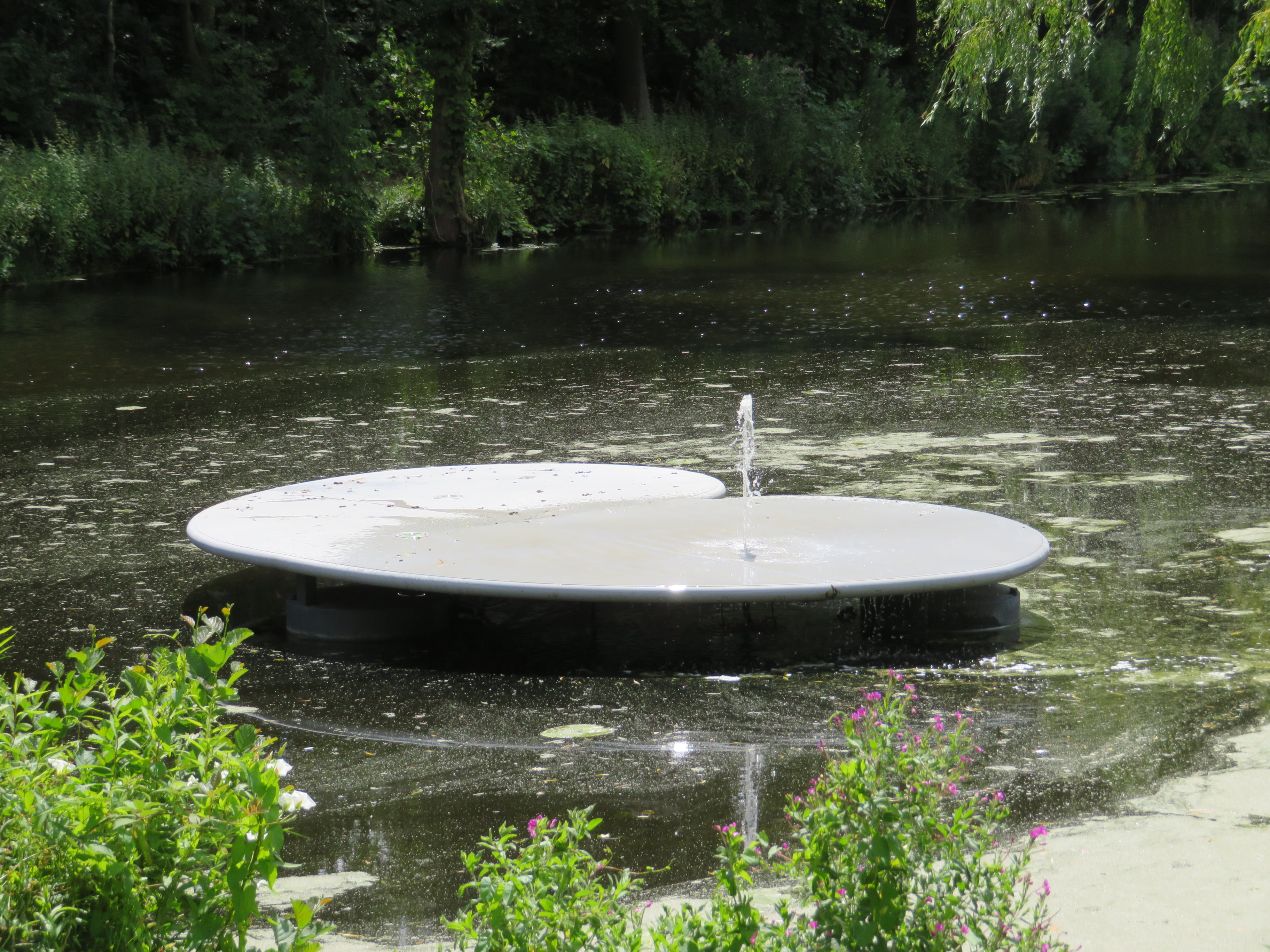 Fontein in de vorm van een pompeblêd in Park Heremastate in Joure, Friesland. Afscheidscadeau voor oud-burgemeester Bert Kuiper in 2011.